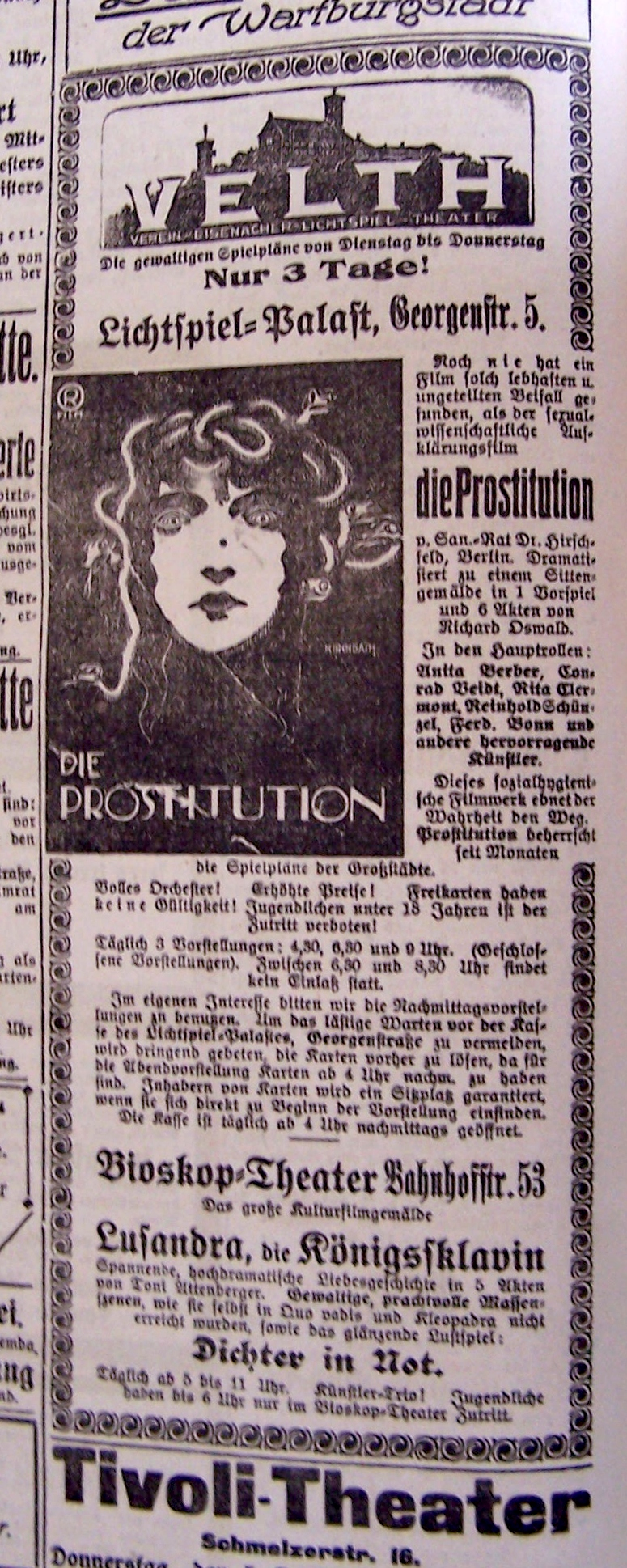 Werbung für den Dokumentarfilm "Die Prostitution" im Programm der Eisenacher Kinotheater.